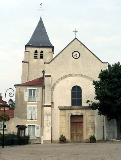 Église de Saint-Thibault-des-Vignes (Seine-et-Marne)